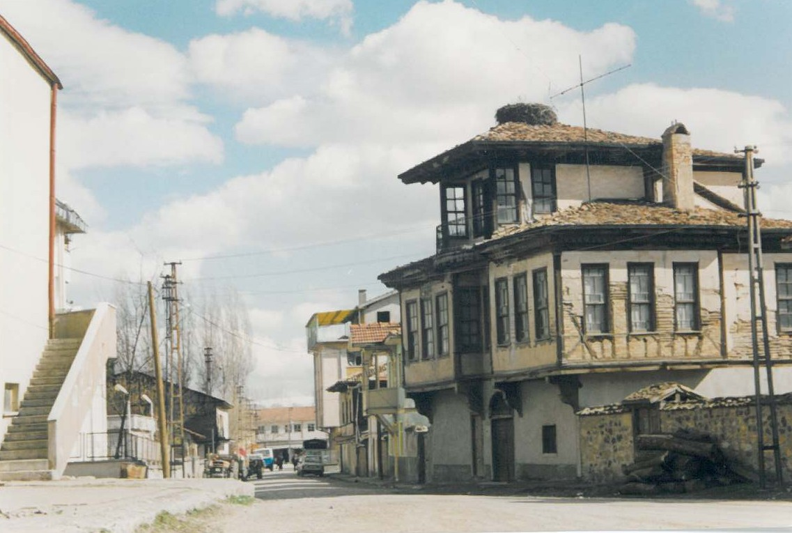 Çerkeş